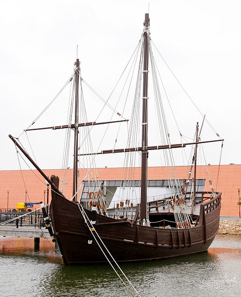 Réplica de la Carabela "La Niña", en el "Muelle de las Carabelas", paraje de La Rábida, Palos de la Frontera (Huelva).